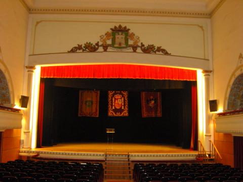 Escenario del Teatro Lope de Vega de Ocaña (Toledo).